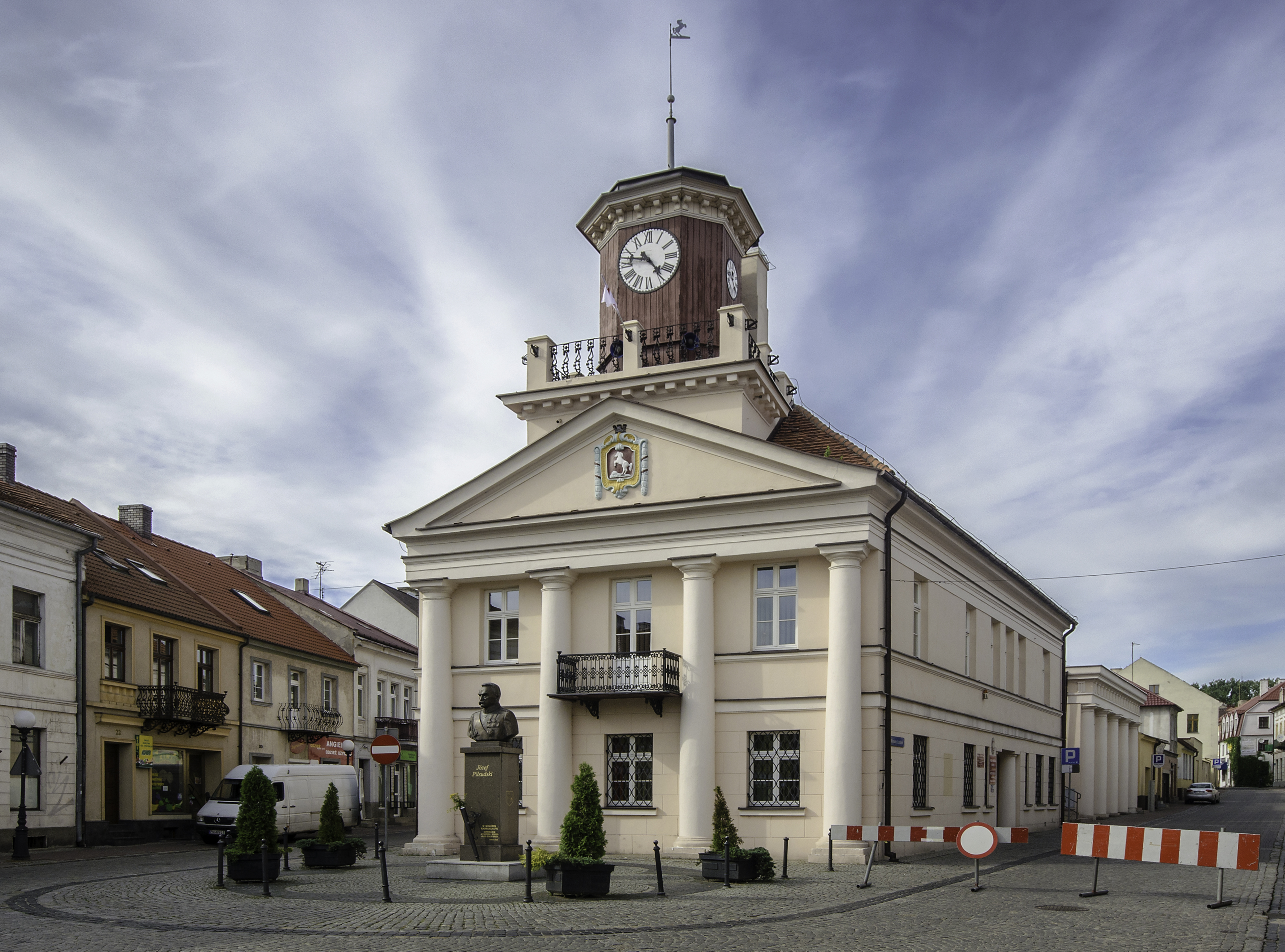 Konin, ratusz, pocz. XIX